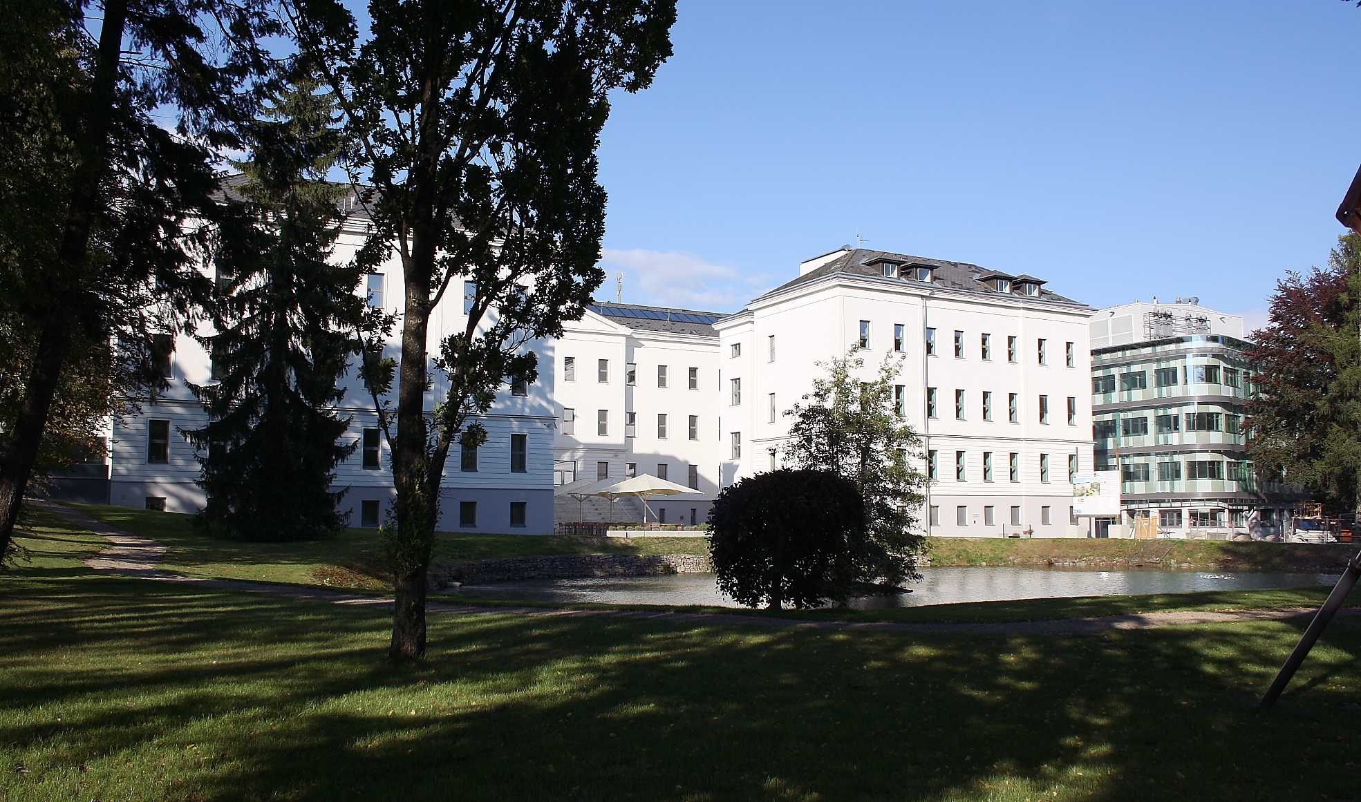 Das Institute of Science and Technology Austria in Maria Gugging, Niederösterreich